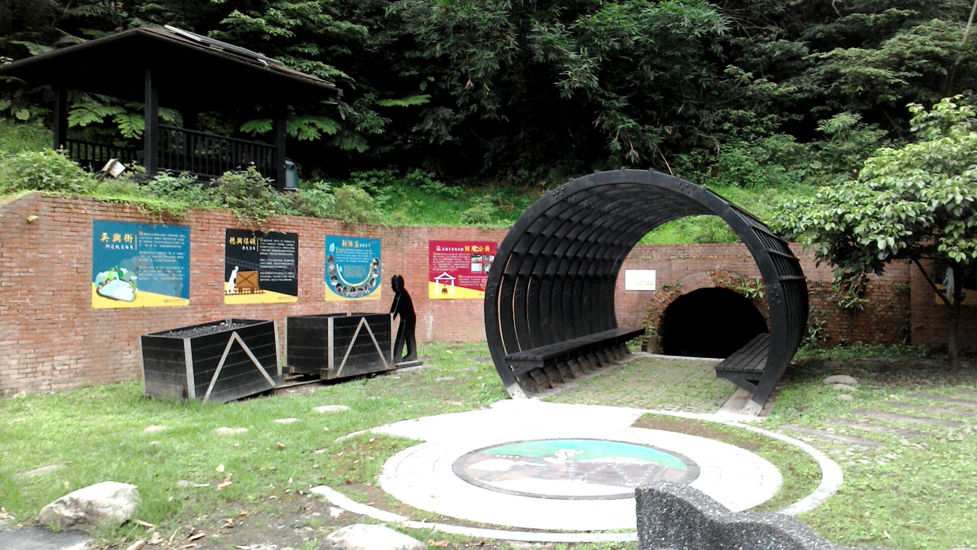 德興煤礦全景,台北市信義區吳興次分區泰和里